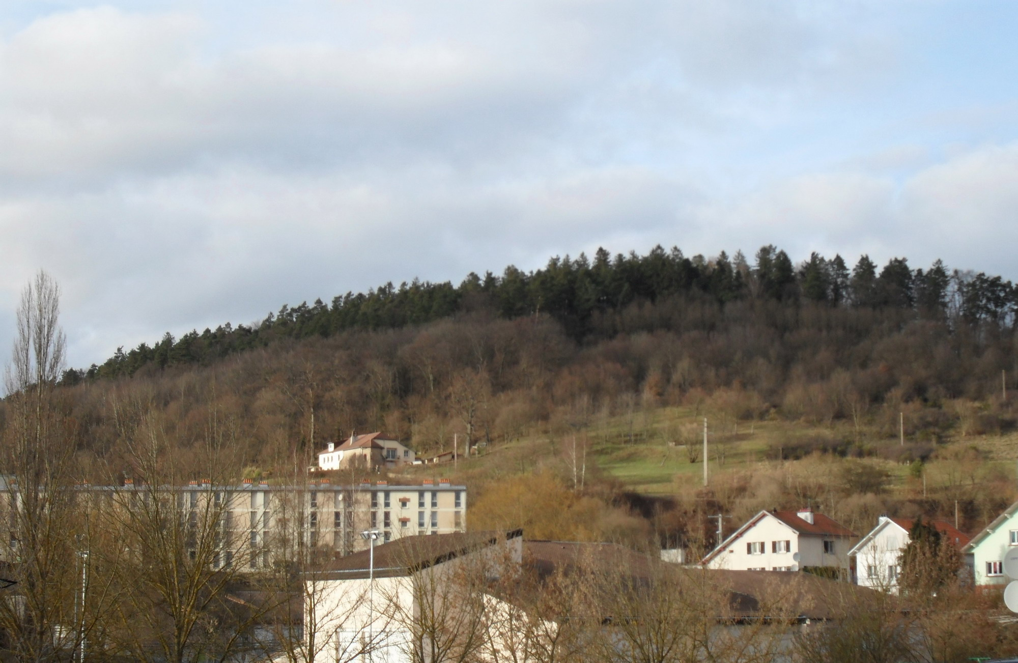 Photographie depuis le versant oriental urbanisé de l'Orme et le quartier Saint-Roch, Saint-Dié. Recadrage numérique et diminution en pixel.